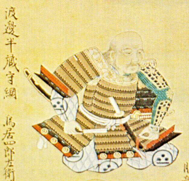 渡辺守綱の肖像画